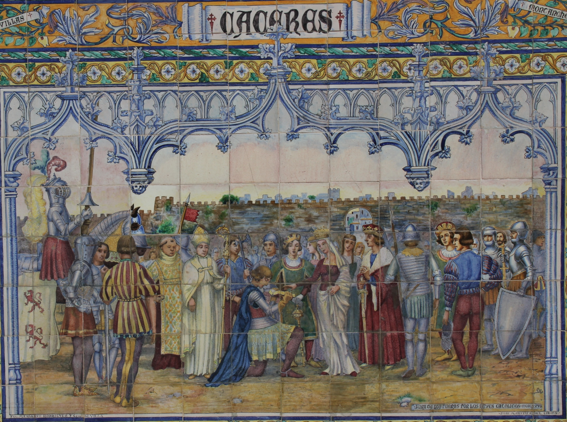 Cáceres na azulejos na Plaza de Espana w Sewilli